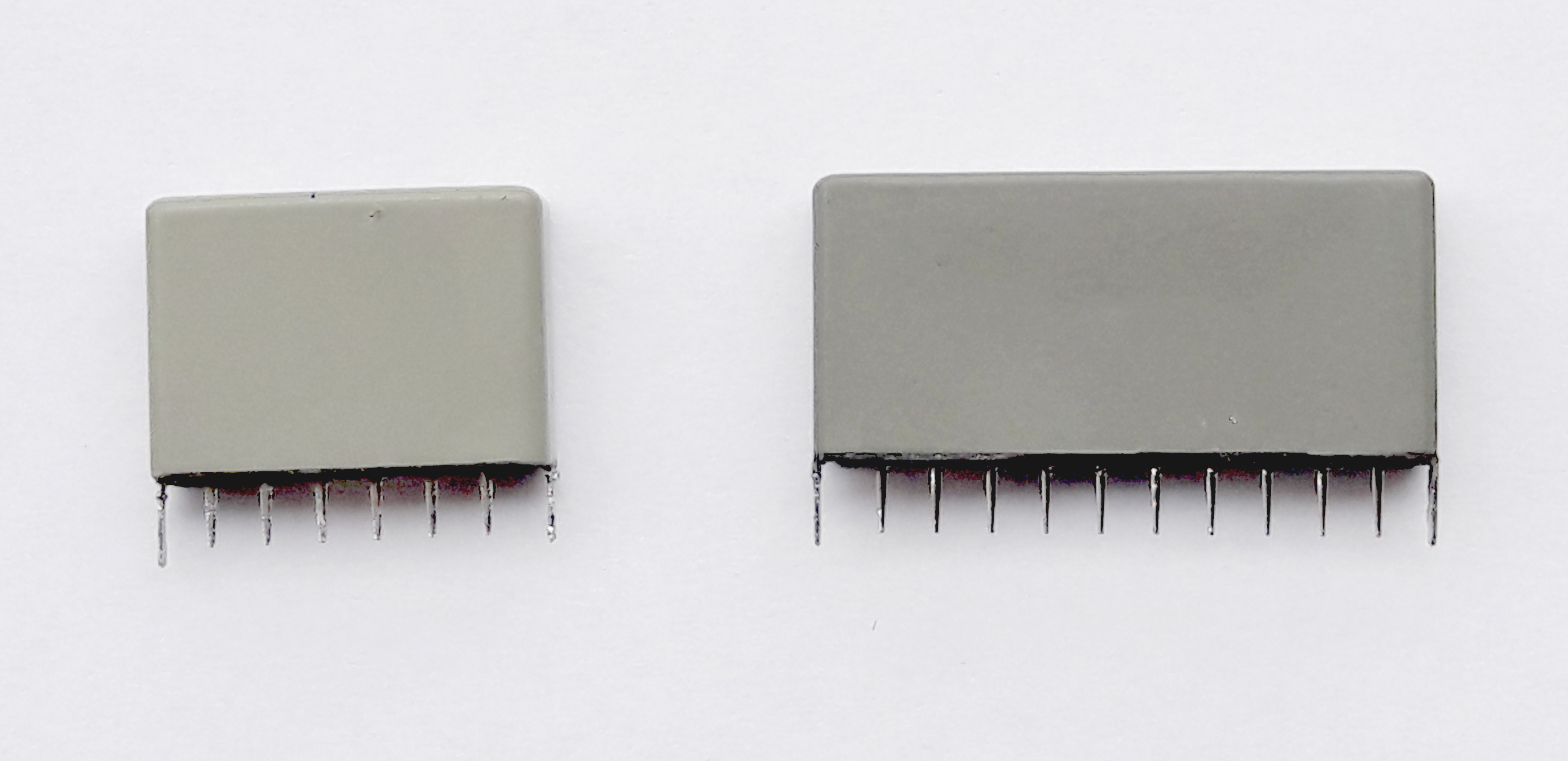 Dünnschicht- Hybridschaltkreise Typen 2336 und 2337 (auch 23-36 und 23-37) aus der Typenreihe KME3, hergestellt im VEB Keramische Werke Hermsdorf, Ansicht von vorn - Dateiname grob fehlerhaft, Duplikat vorhanden